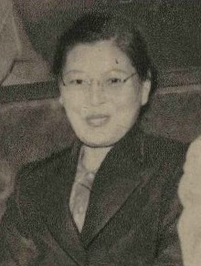 国会傍聴席に座る徳田たつ（徳田球一夫人）